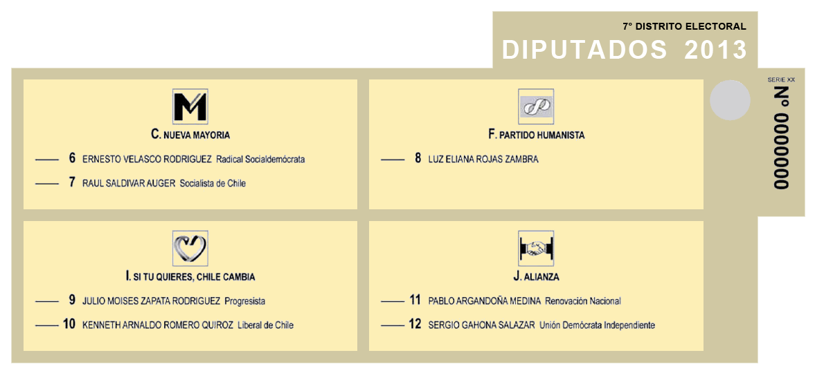 Reproducción de la cédula de votación utilizada en el Séptimo Distrito Electoral (La Serena) para las elecciones parlamentarias de Chile de 2013.